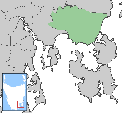 Conseil de Sorell; tasmanie; Australie